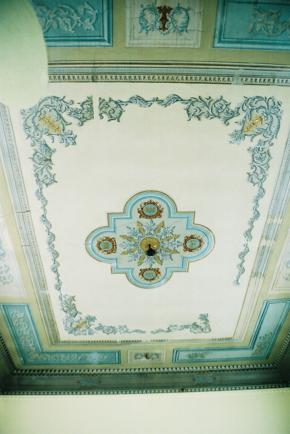 מרכז האמנויות ברחוב יפת בתל אביב-יפו